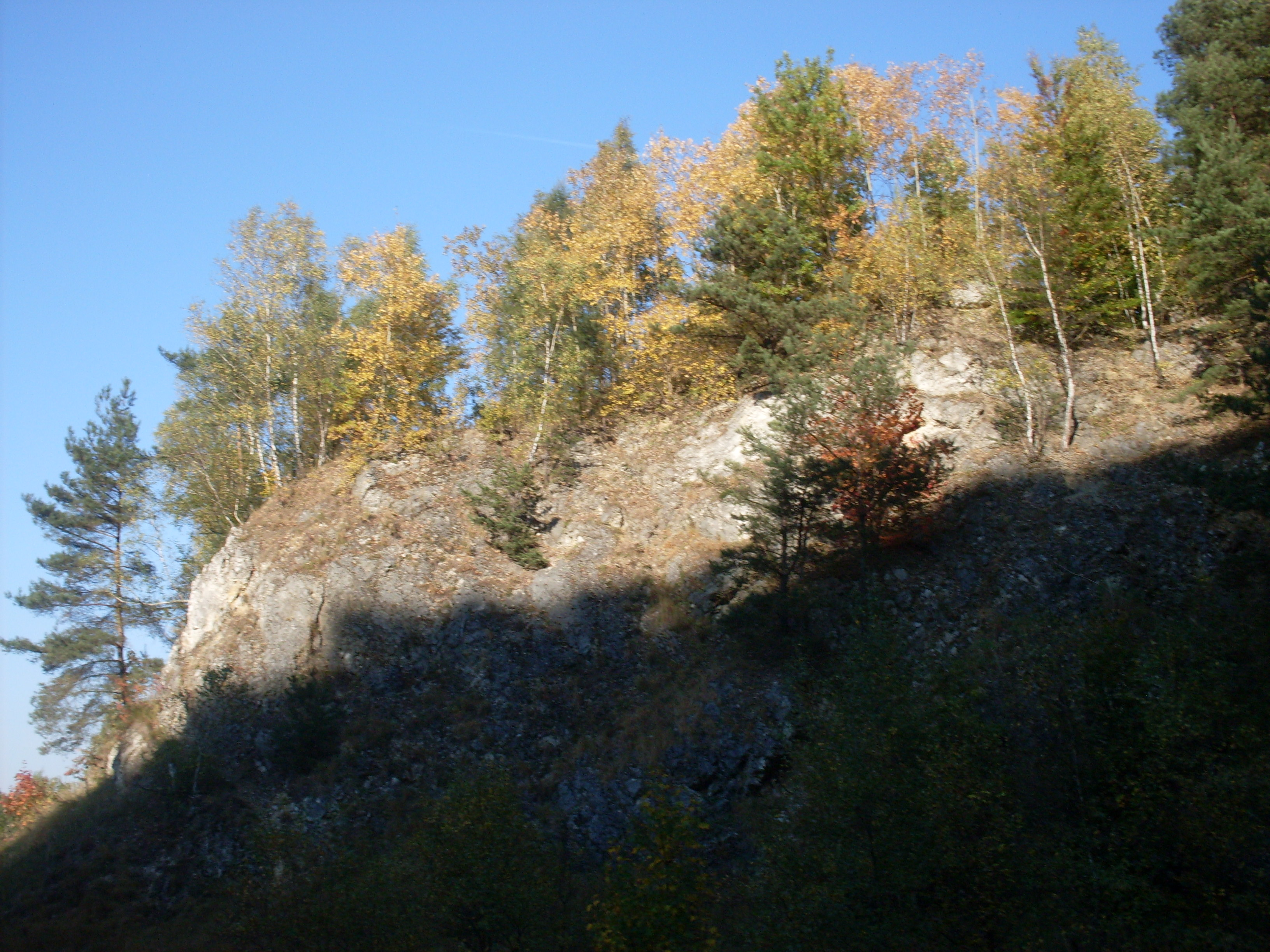 Krzeszowice Stara Sztolnia.Wzgórze cz. wzgórza Ułańskie Zdrowie